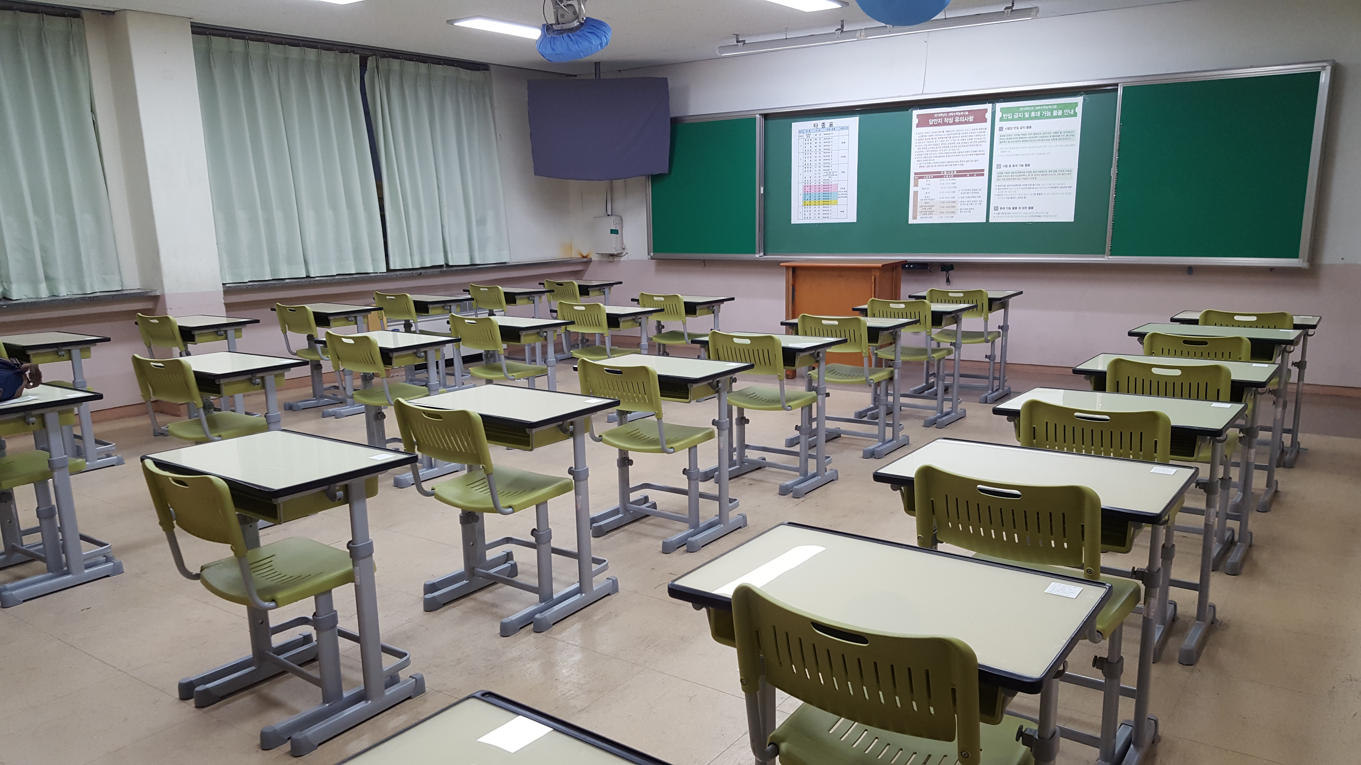 2018학년도 대학수학능력시험 경기도교육청 35지구 제7시험장으로 선정된 부흥고등학교 안에 있는 시험실